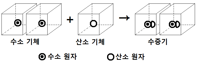 아보가드로가 생각한 돌턴 원자설 문제점